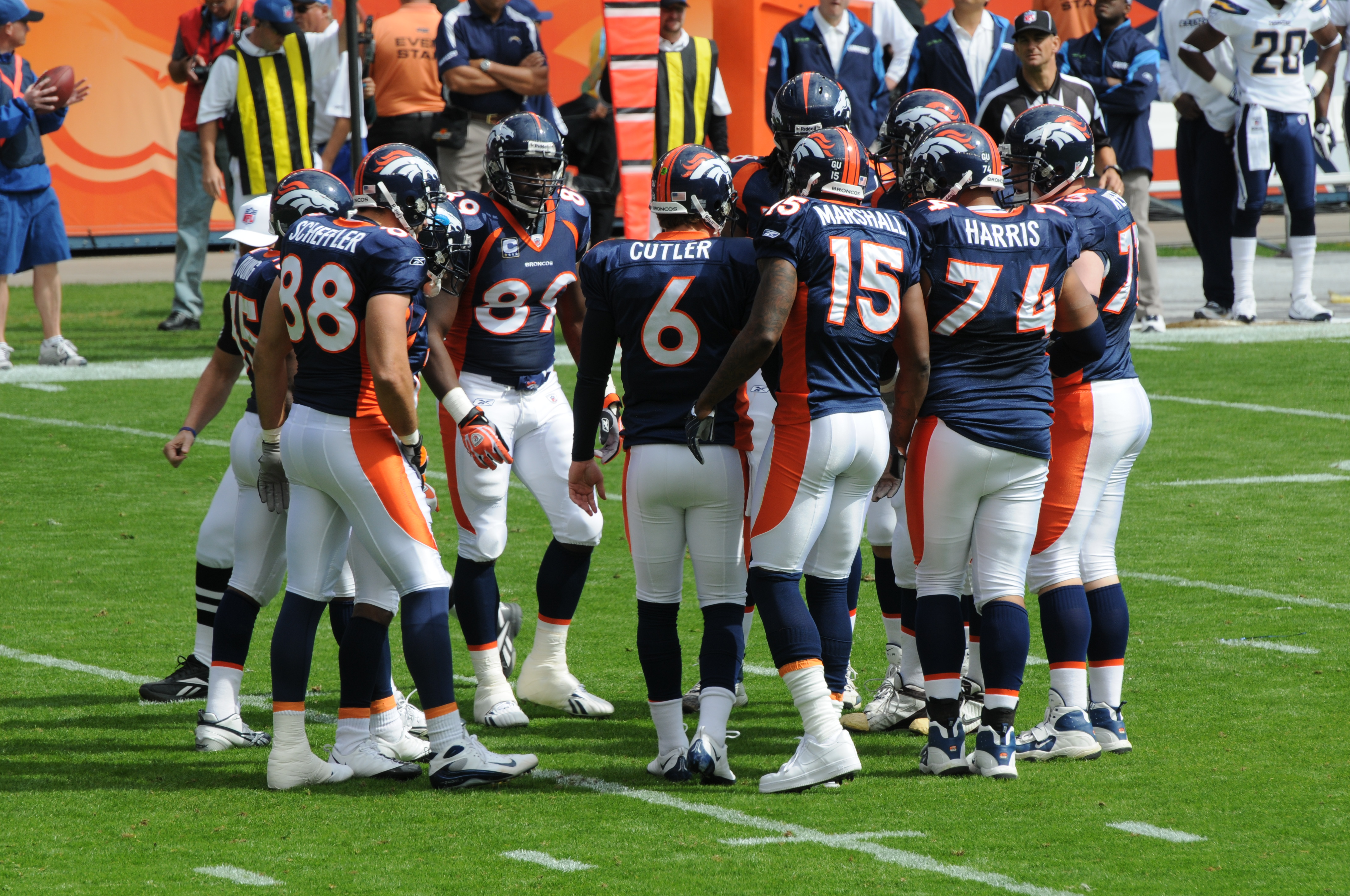 DenverBroncos, 2008